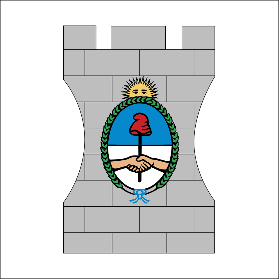 Logo del SPF, torreon gris con el escudo nacional argentino en el centro